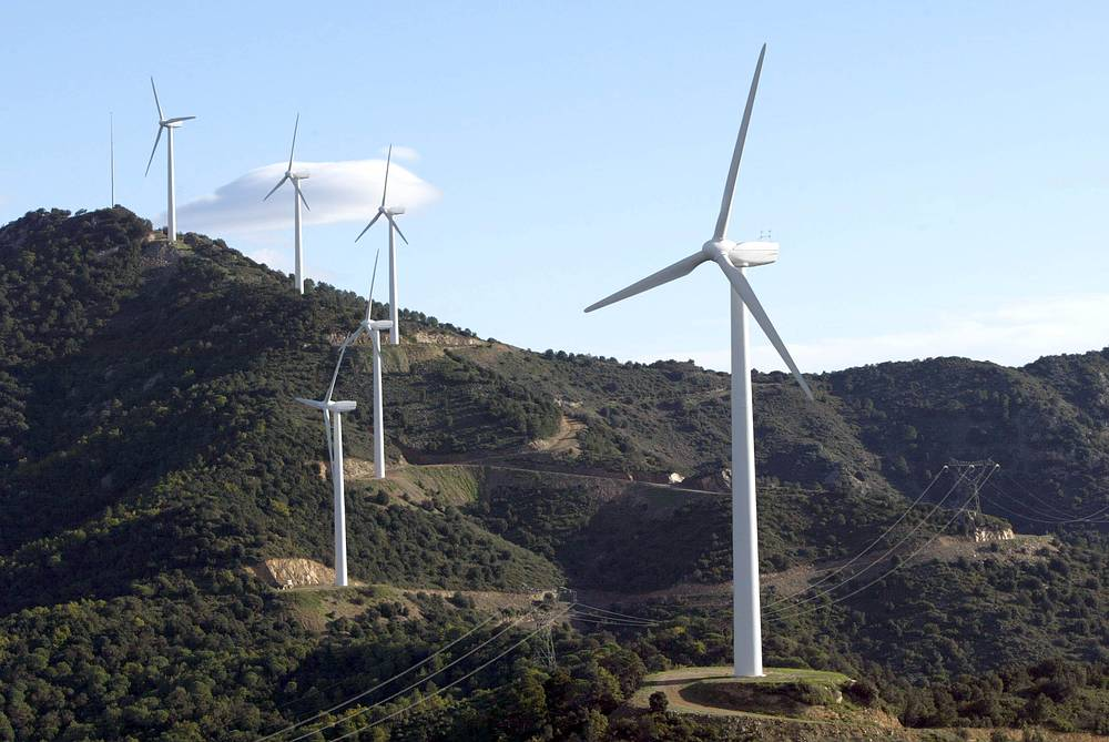 Fotografia del Parc Eòlic del Collet dels Feixos